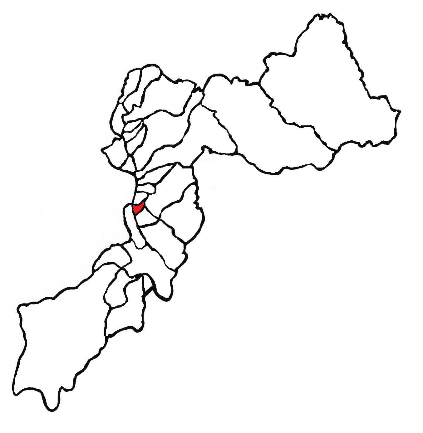 Ubicación del distrito en la provincia de Huancayo, departamento de Junín, Perú